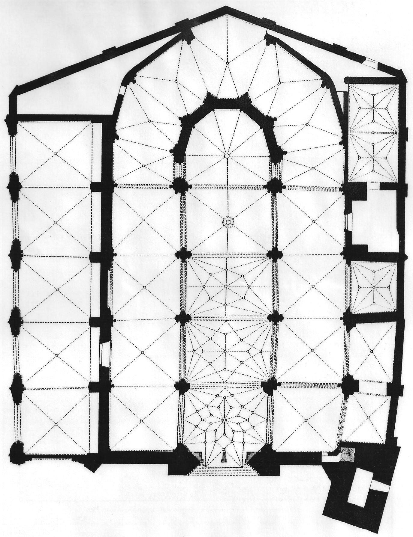 Plano dibujado a mano.